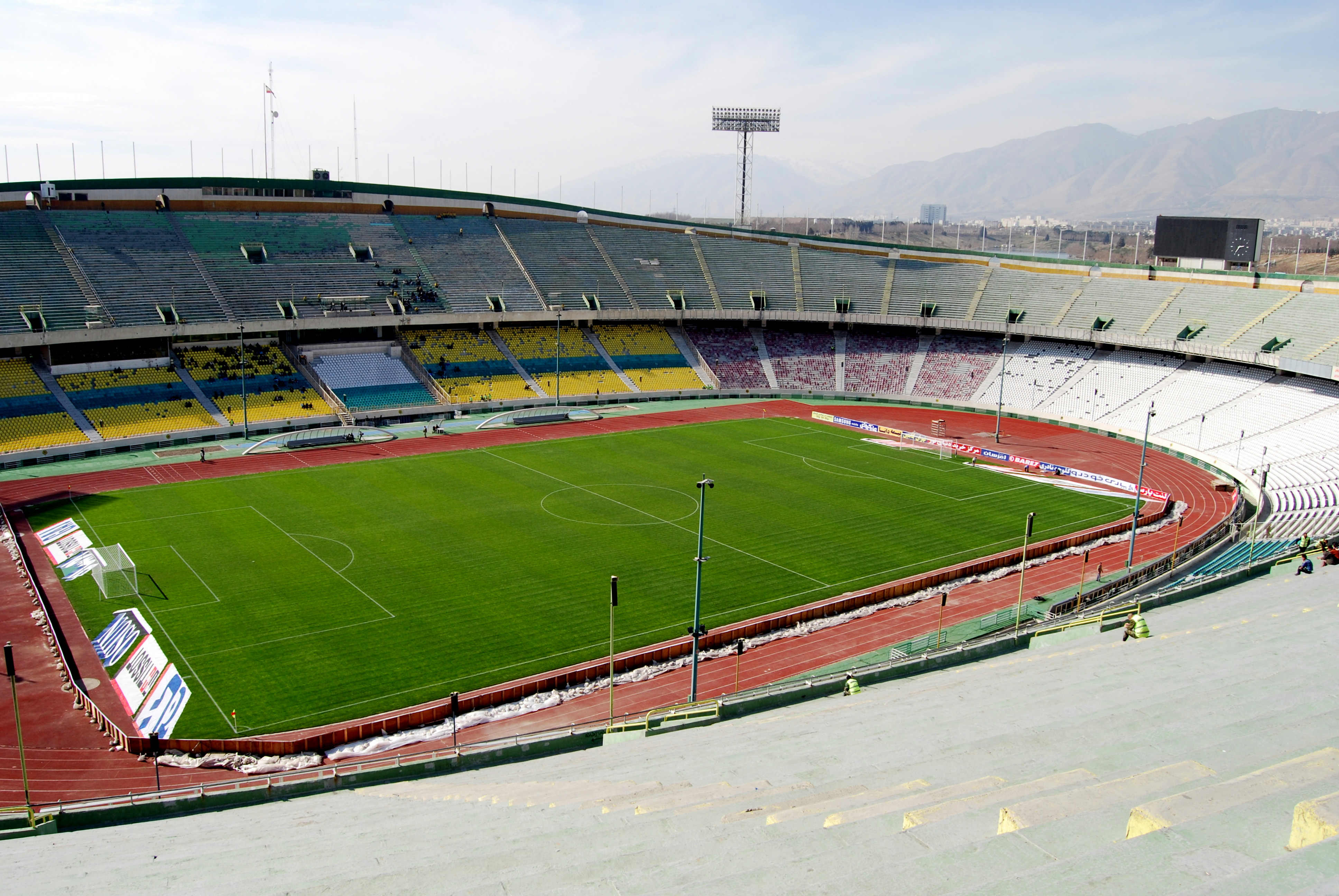 ورزشگاه آزادی در فوریه ۲۰۰۸